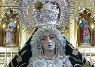 María Santísima de las Angustias